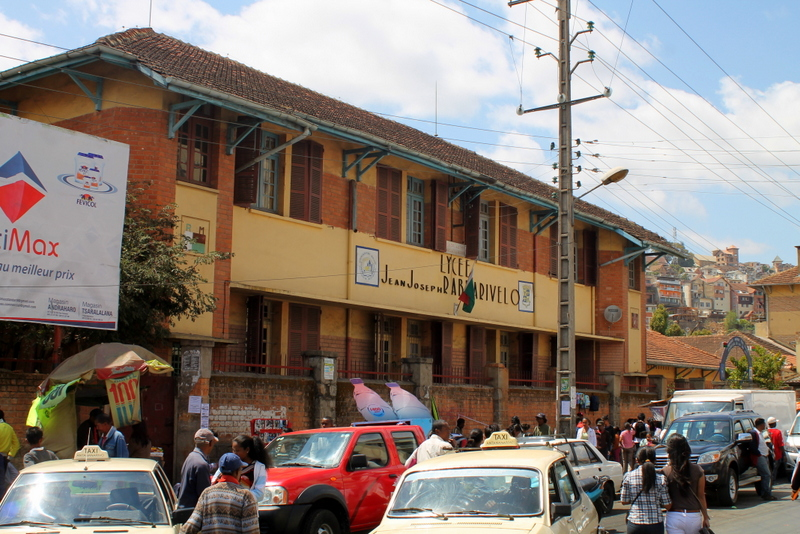 Antananarivo september 2015